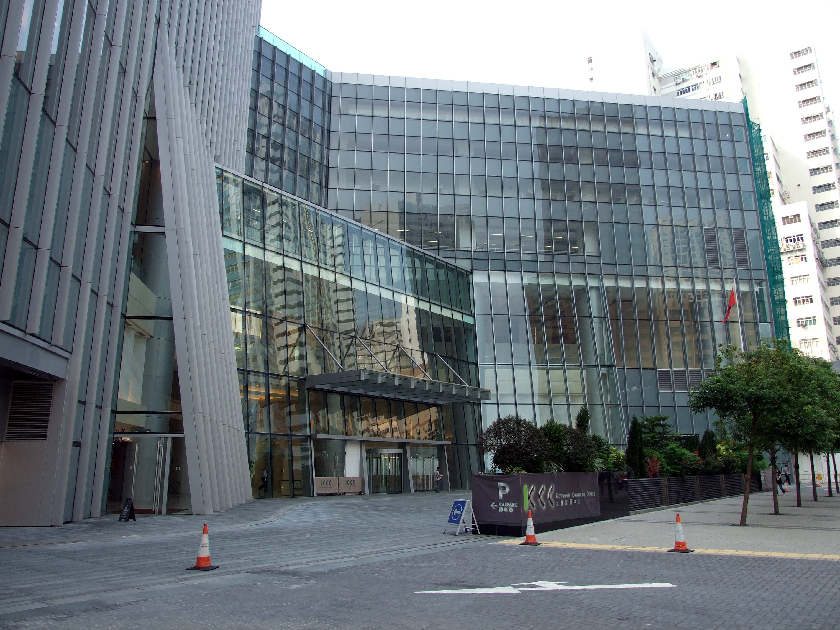 中文（香港）: 九龍貿易中心基座